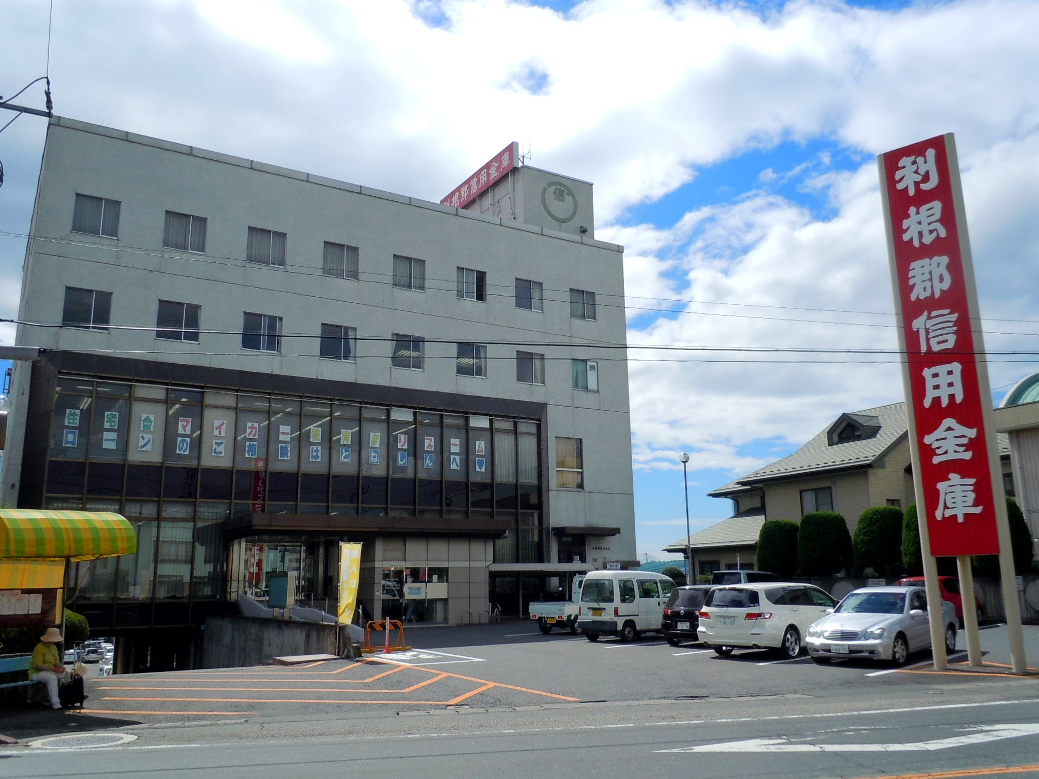 利根郡信用金庫本店